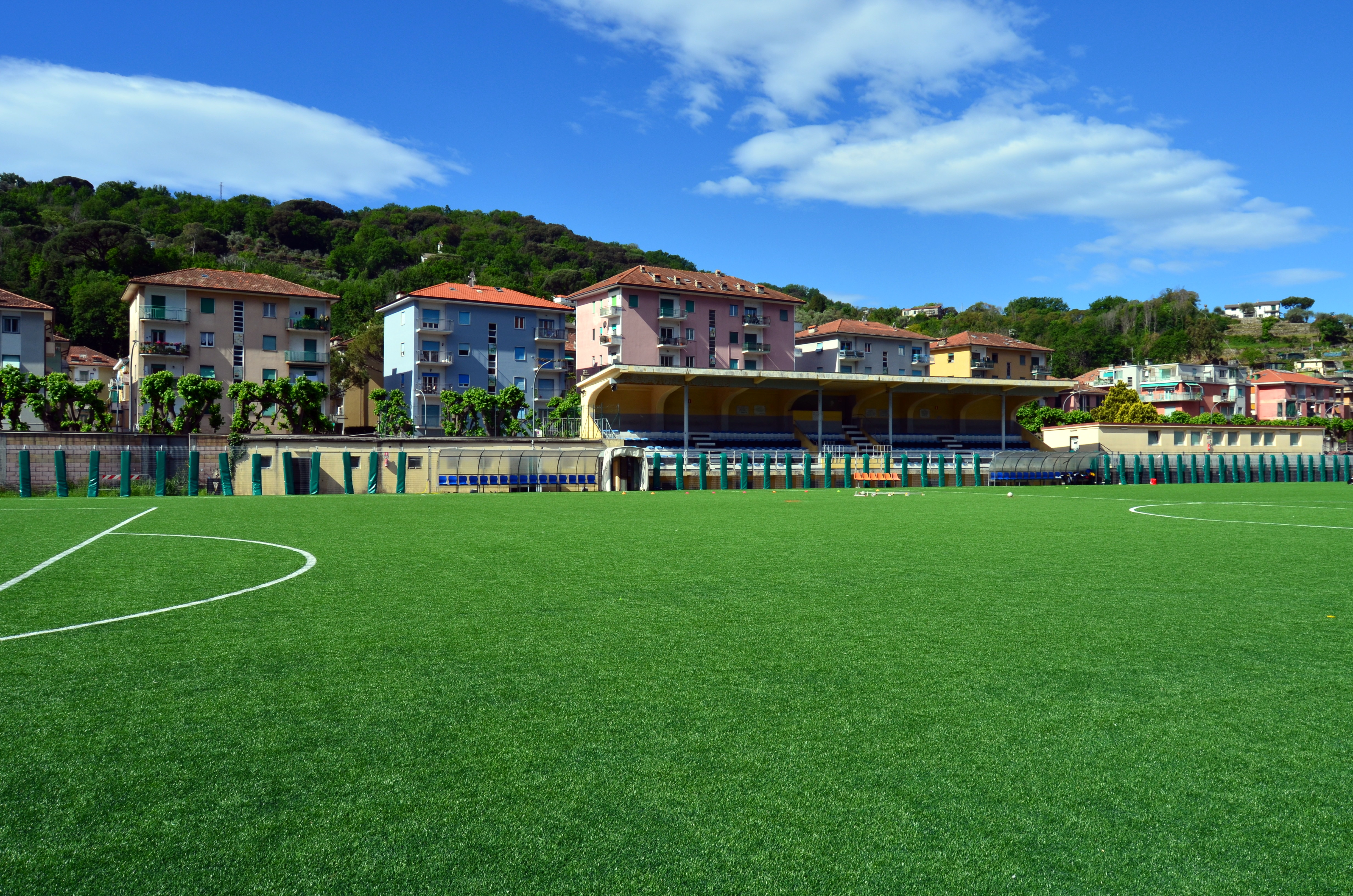 Campo sportivo comunale "Umberto Macera" di Rapallo, Liguria, Italia